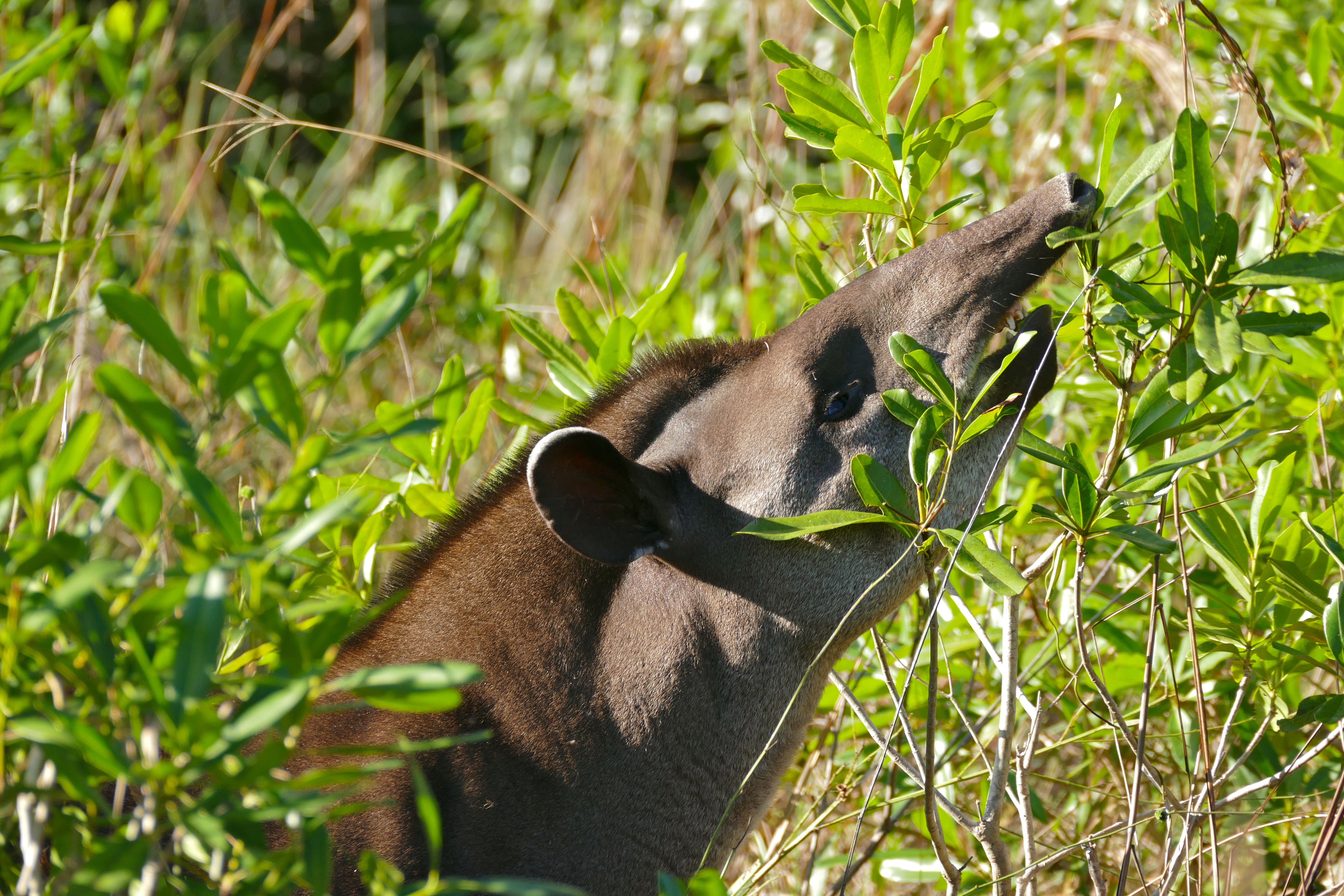 Pouso Alegre, Transpantaneira, Poconé, Mato Grosso, BRAZIL